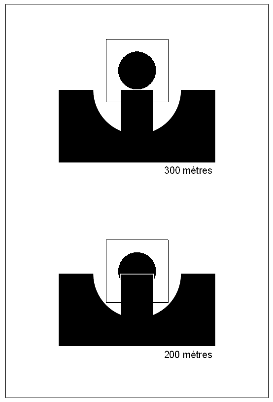 Visée du mousqueton 31